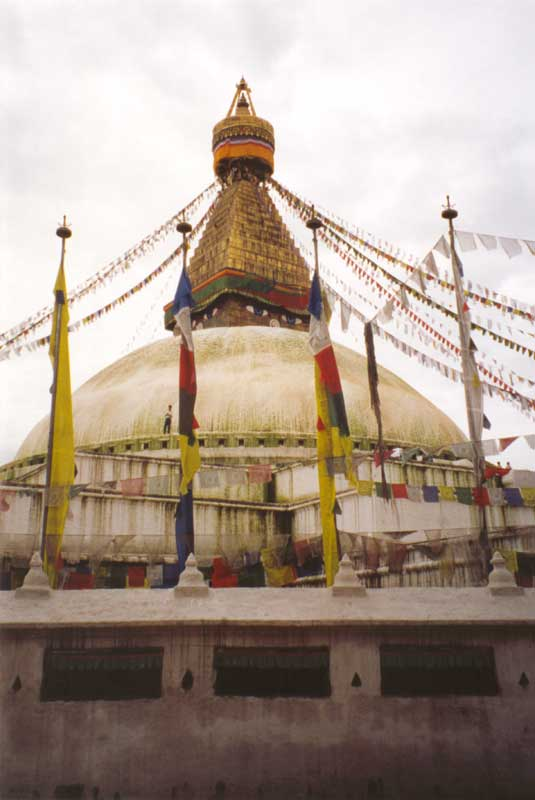 le stûpa de Bodnath au Nepal